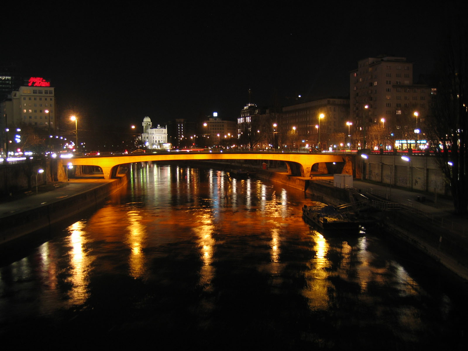 Wien, Schwedenbrücke, Urania in the background.